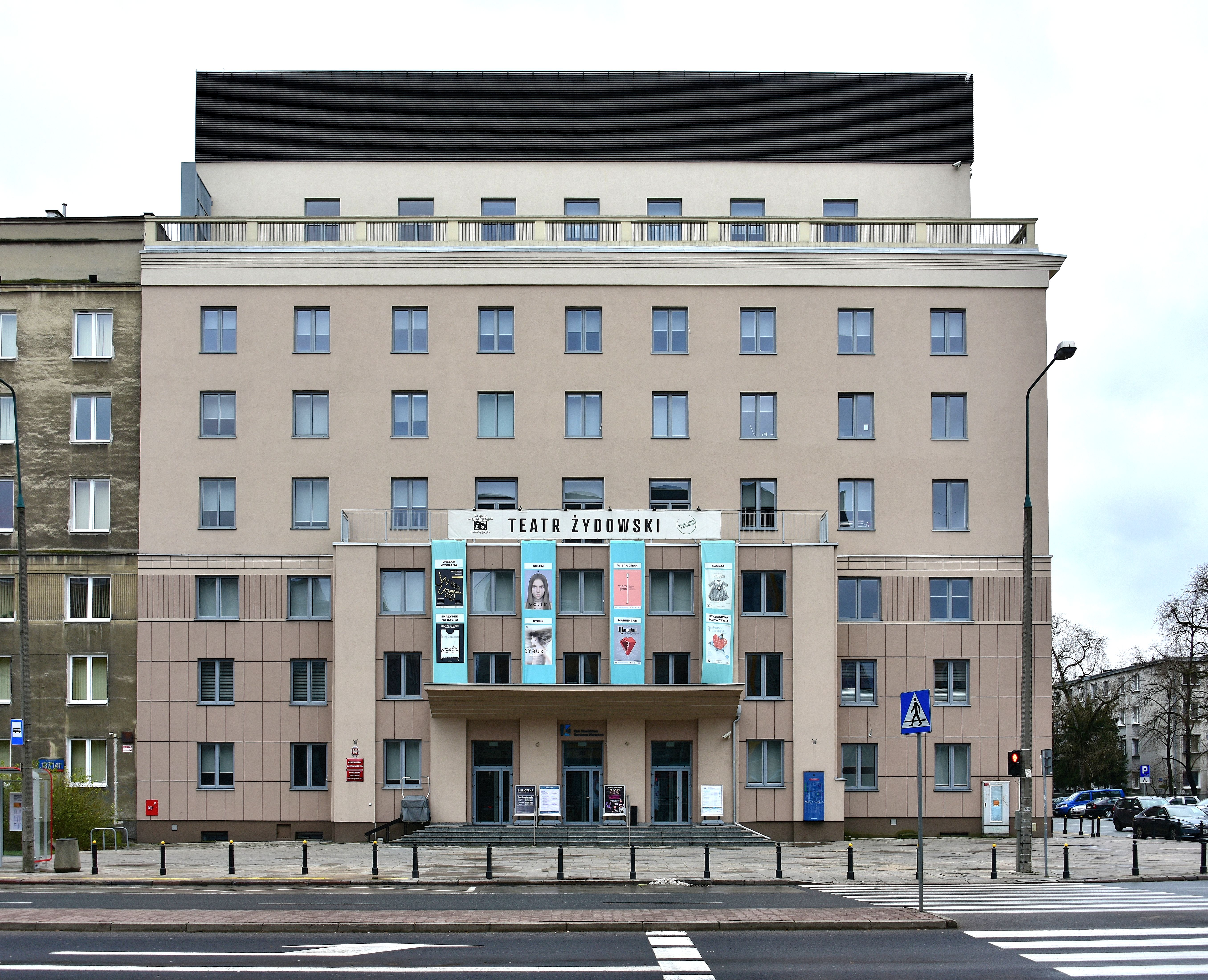 Klub Dowództwa Garnizonu Warszawa w al. Niepodległości 141a